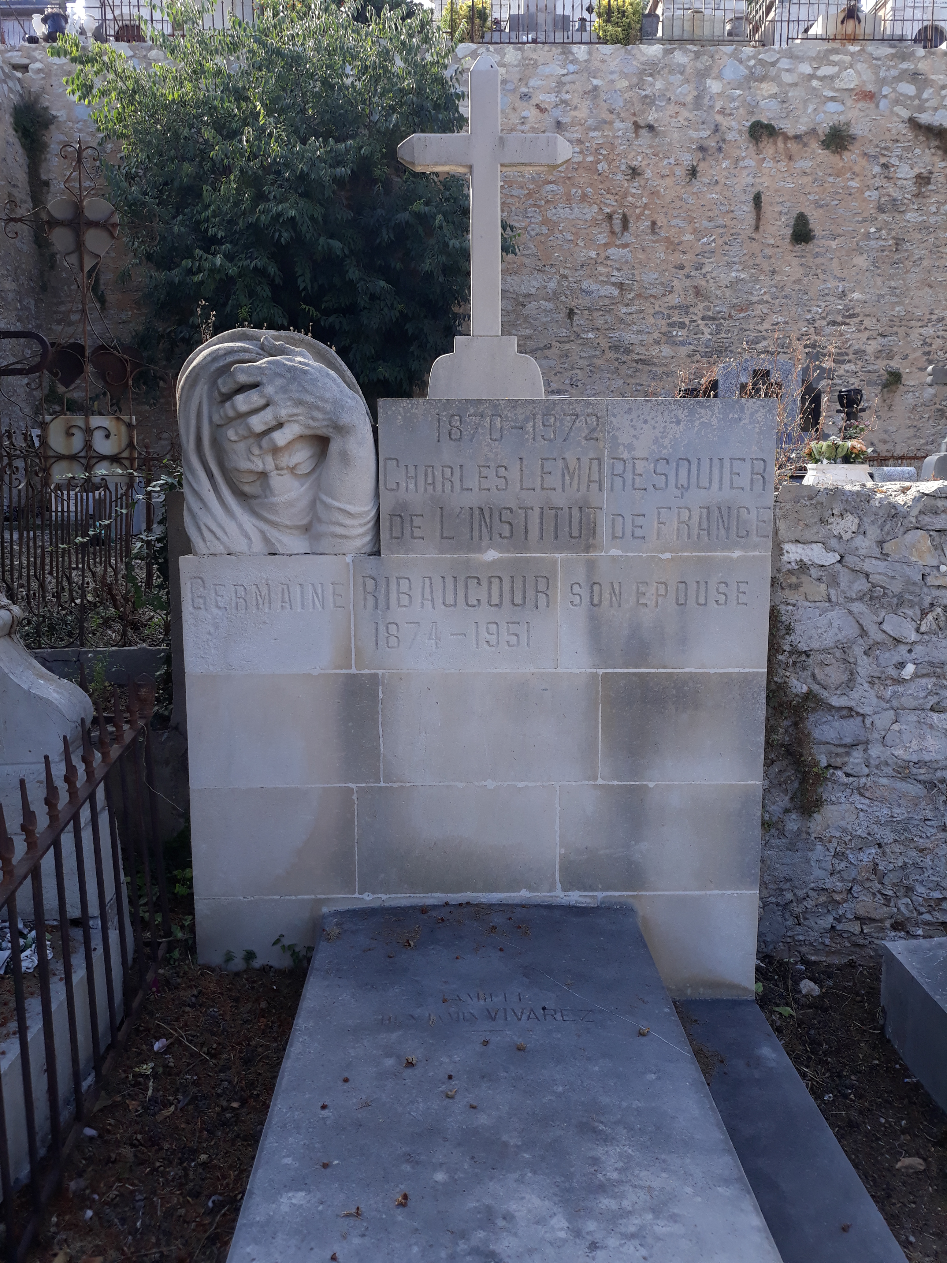 Das Grab des französischen Architekten Charles Lemarequier auf dem Cimetière Marin in Séte (Hérault).